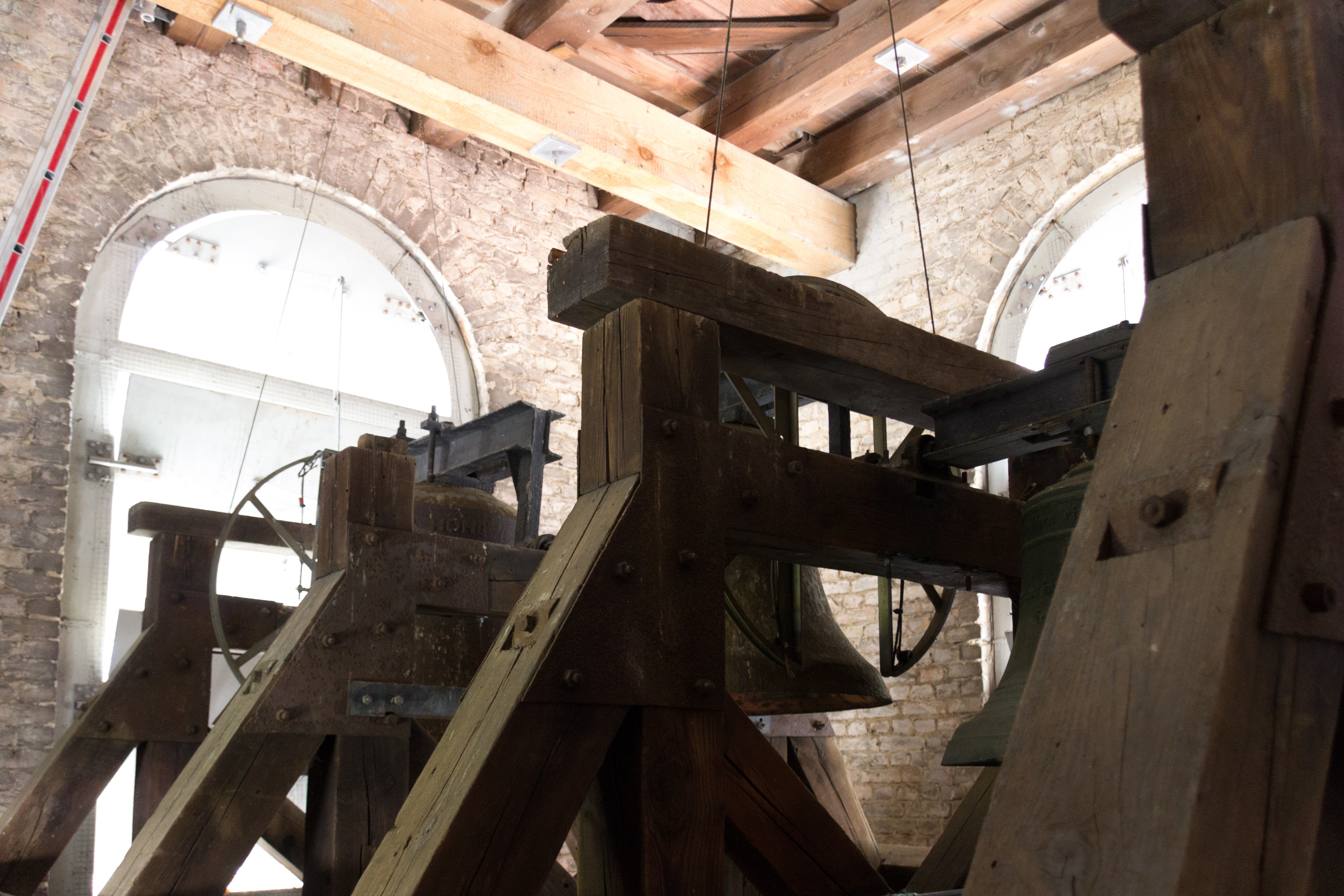 Dorfkirche Hohen Neuendorf Glockenstuhl